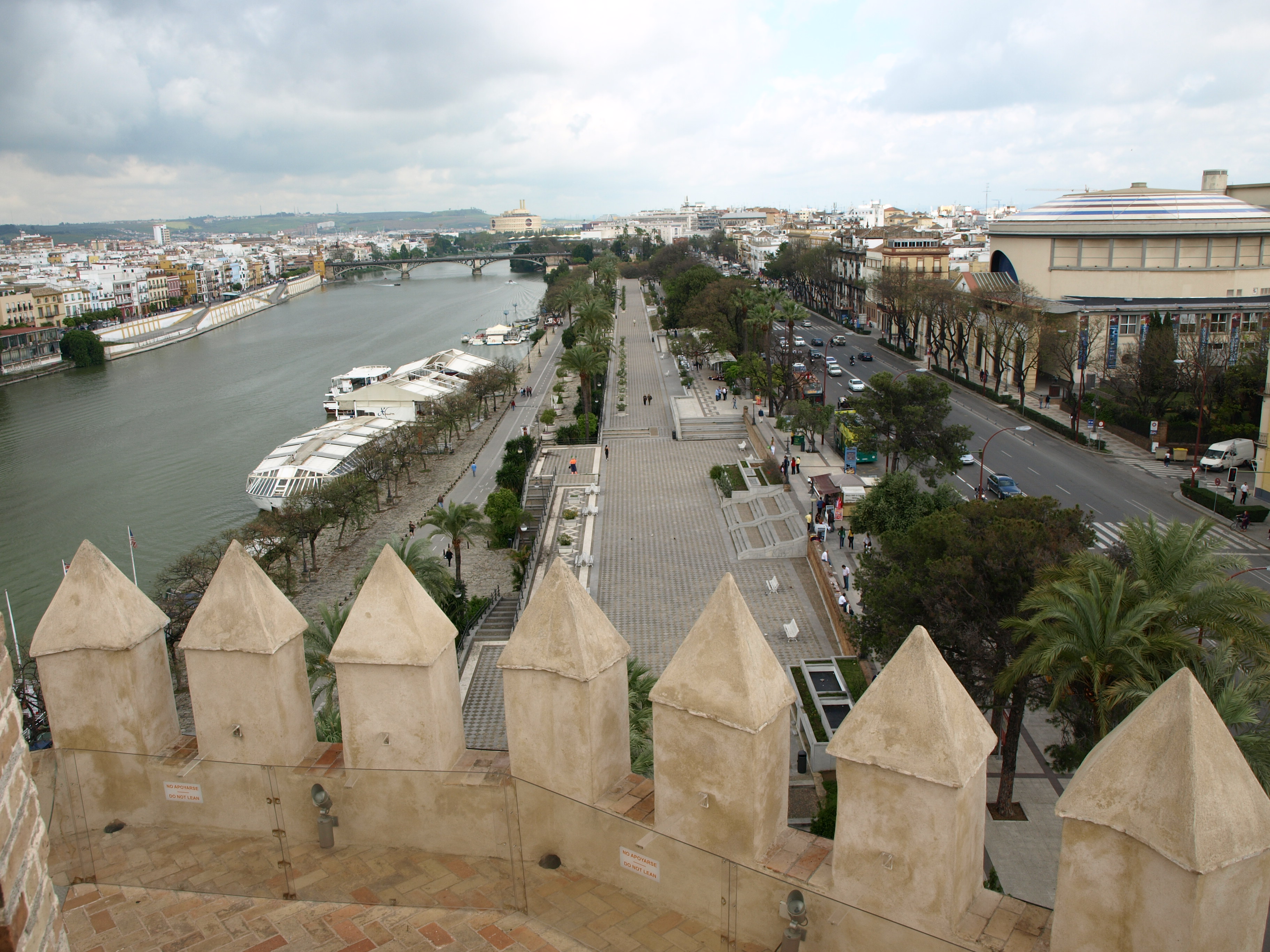 dalla Torre dell'Oro